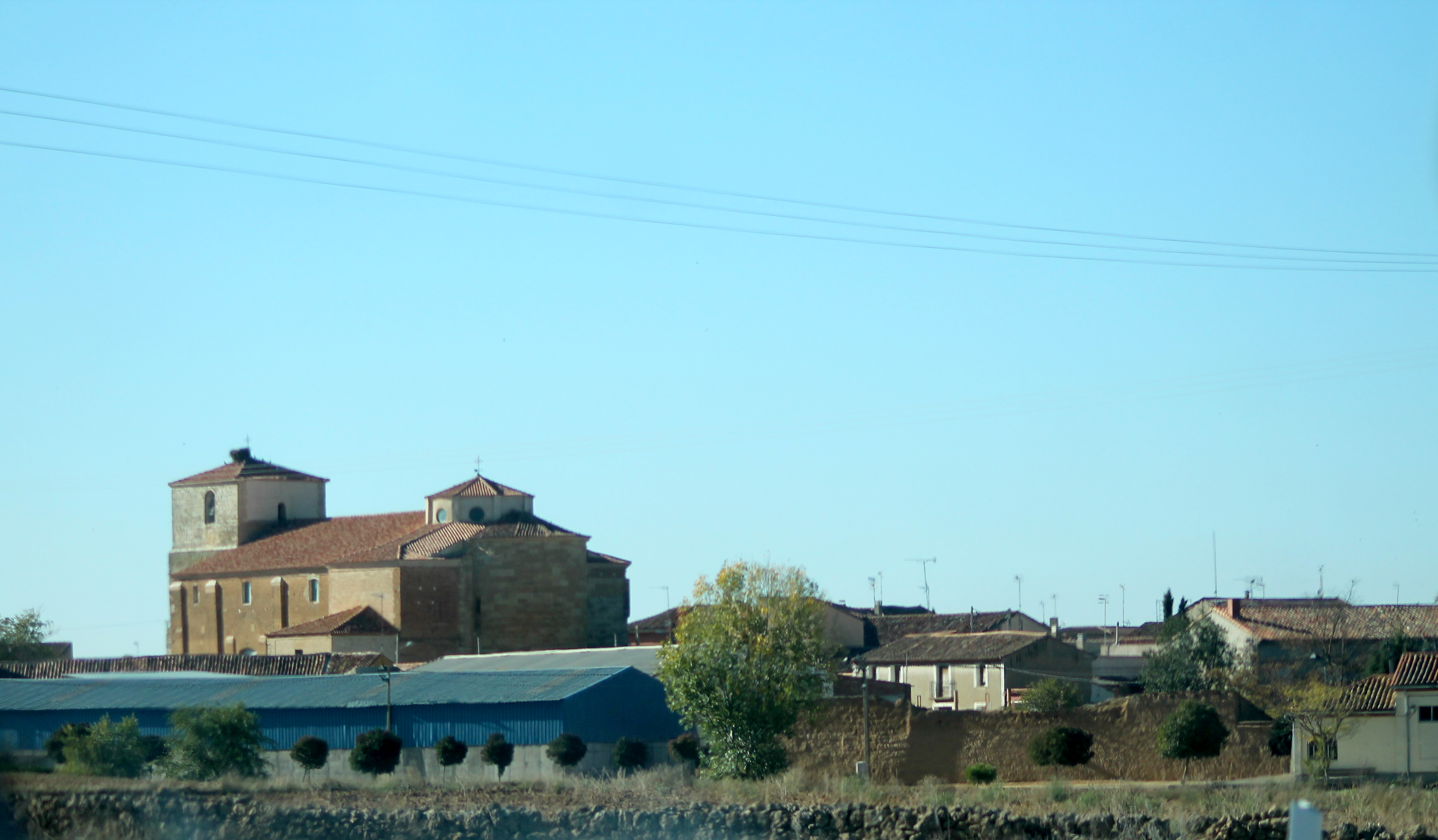 Berrueces